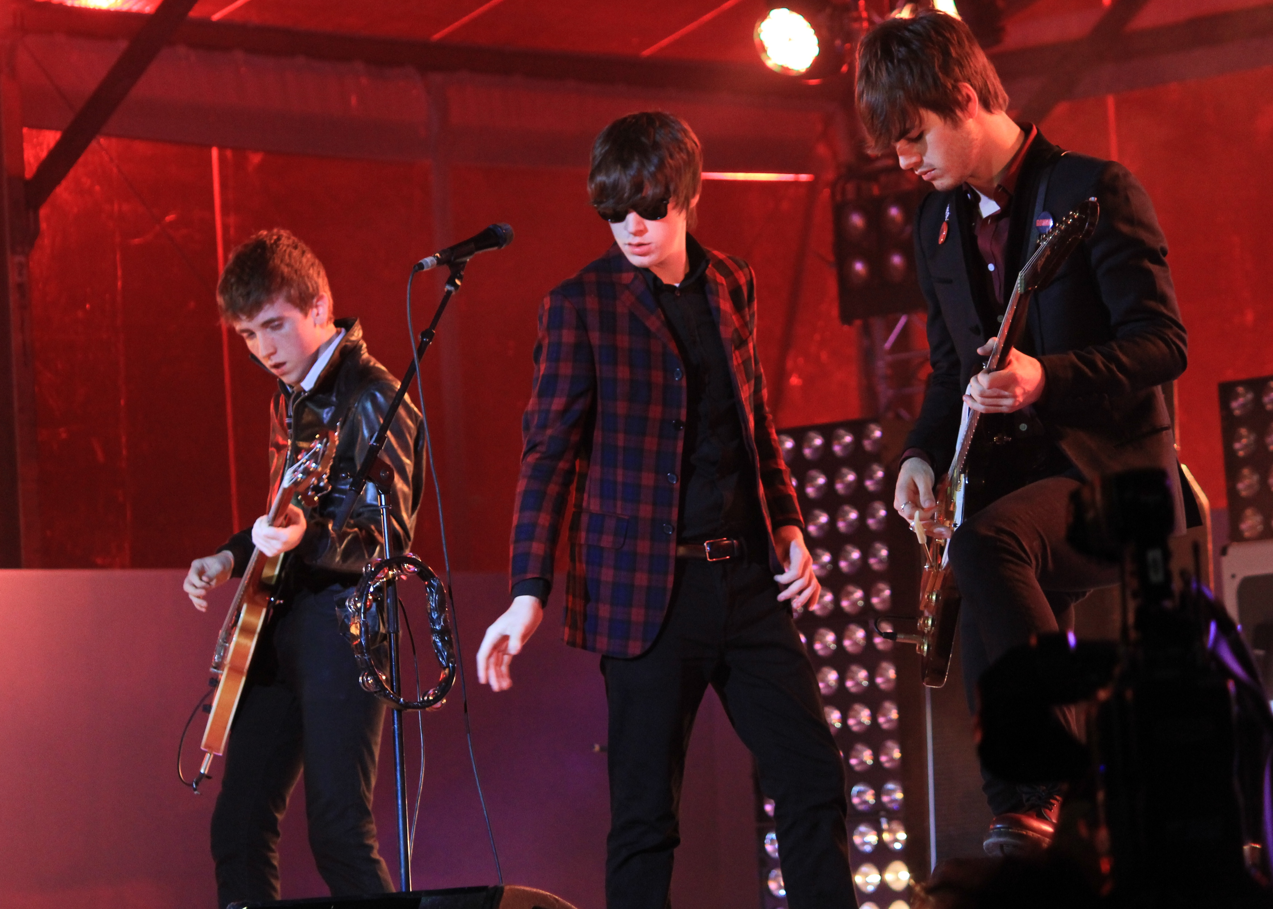 Concert de The Strypes lors du festival interceltique de Lorient 2014.